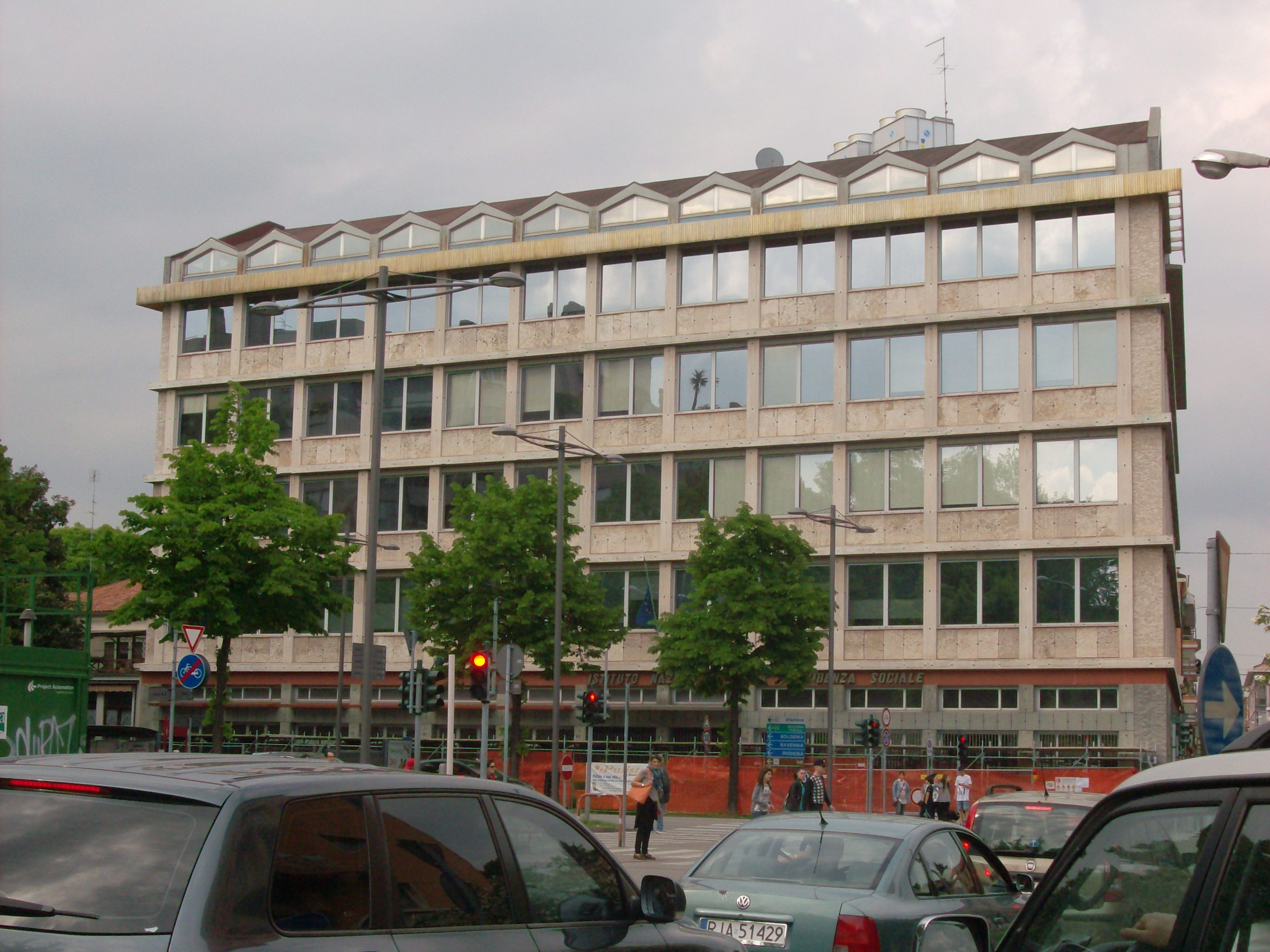 Palazzo INPS